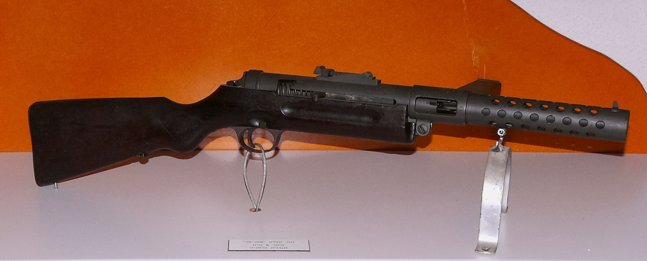 MP28 in Yoav Fortress